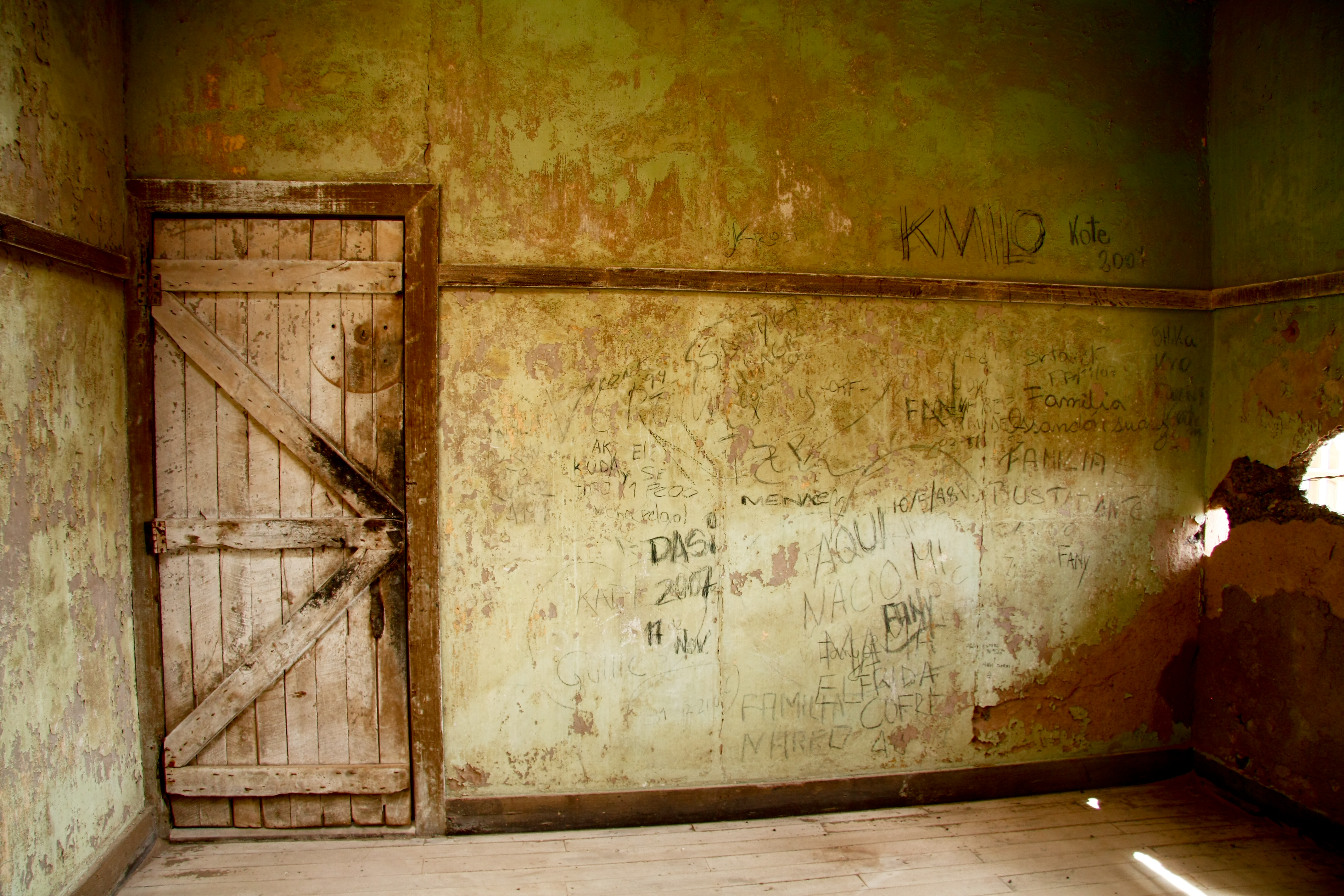 Oficina Salitrera Humberstone This is a photo of a national monument in Chile: 116